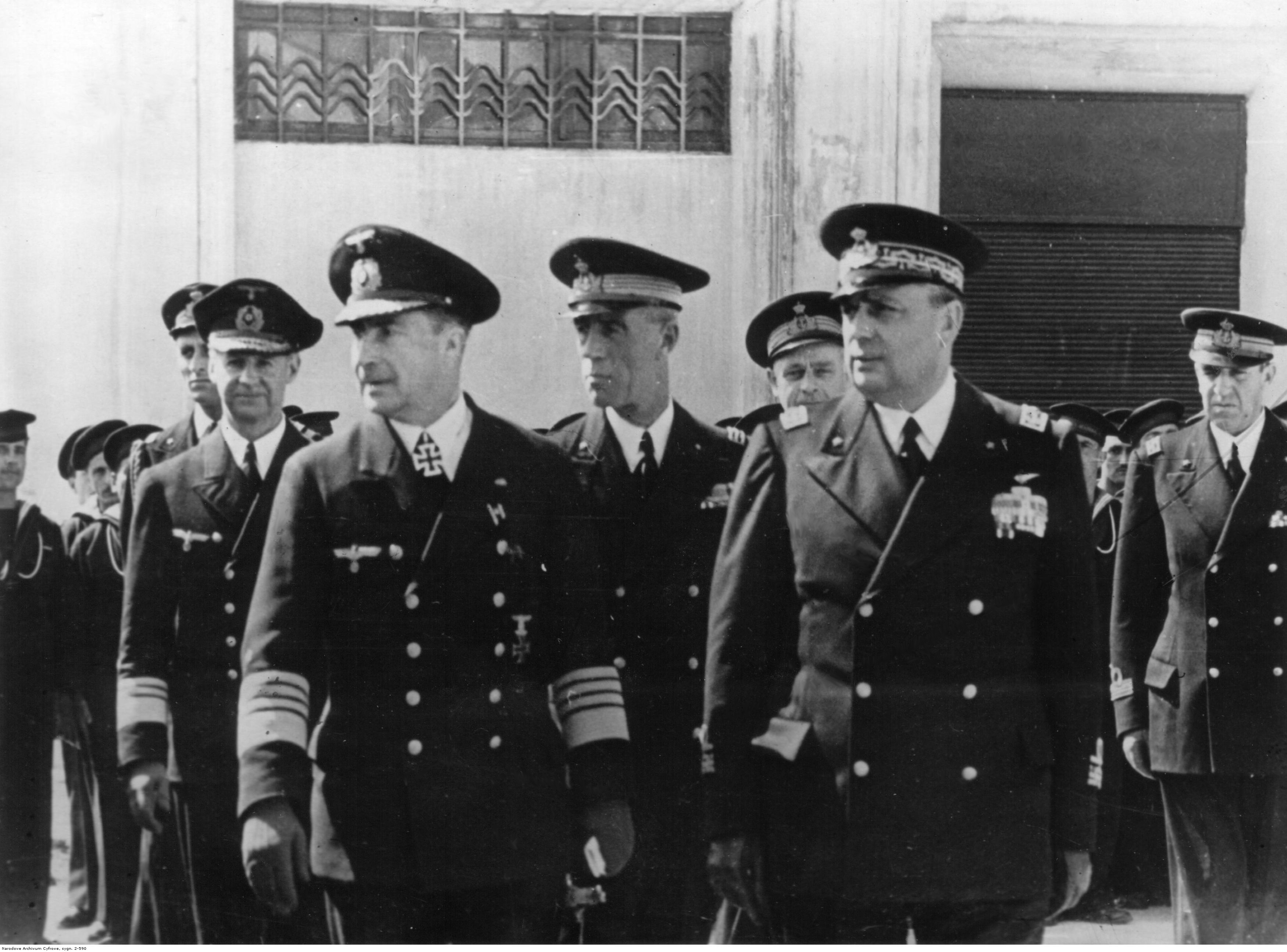 Wizyta admirała Kurta Fricke (w pierwszym rzędzie z lewej strony) we włoskich jednostkach marynarki wojennej. Obok niego włoski kontradmirał Gaetano Catalano, w tylnym rzędzie pierwszy z lewej niemiecki wiceadmirał Werner Lange.